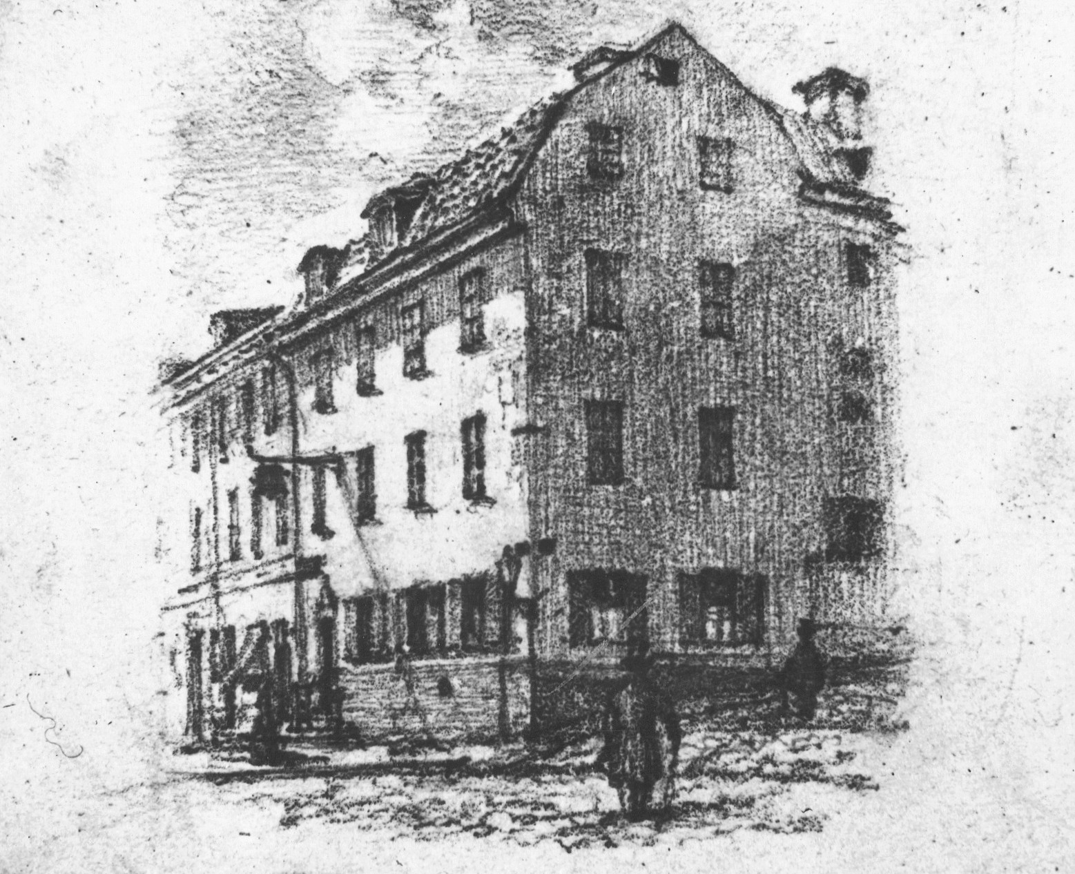 Källaren Tre Remmmare